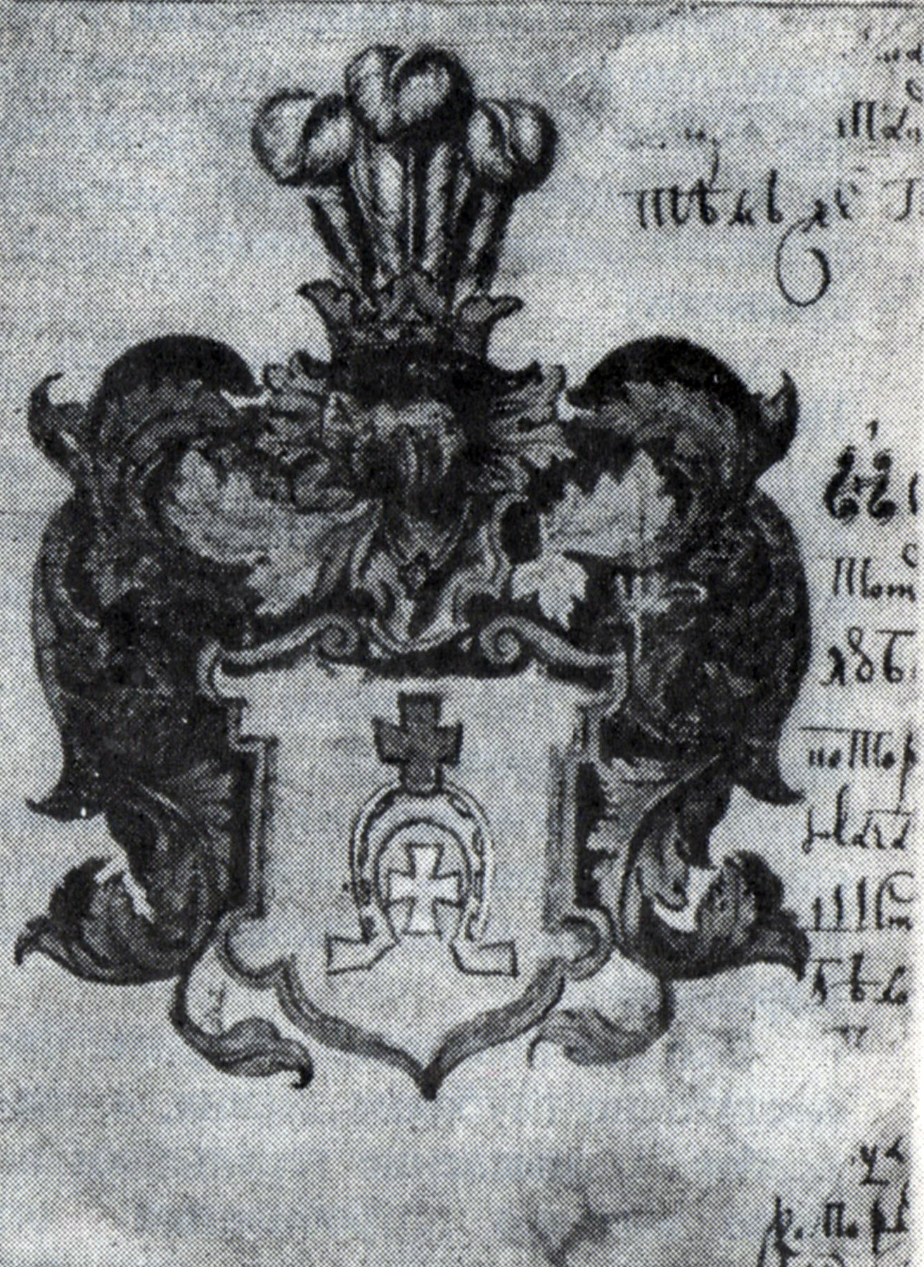 Герб, поданный Грушецкими в 80-е годы XVII в. поданный в Палату родословных дел, приложенный к родословной росписи, с его описанием со ссылкой на гербовник “Орбис Полонус” (1642 г.). «…Но большинство гербов, на которые претендовали русские дворянские семьи, восходят к польской геральдике. Они находятся в росписях Грушецких, Карбышевых, Клокачевых, Колдычевских. Грушецкие приложили к росписи рисунок герба и дали его описание со ссылкой на гербовник “Орбис Полонус”: это герб Любич. По их легенде этот герб имел некий ”ратоборец”, участвовавший в войнах князя Казимира Мазовецкого, воин “того роду, которые тем гербом – крестом с подковой печатаются” » (Бычкова М.Е. Гербы русских дворян конца XVII в. // Гербовѣдъ : Журнал. — М: 1997. — № №7 (19). — С. 104-109.)